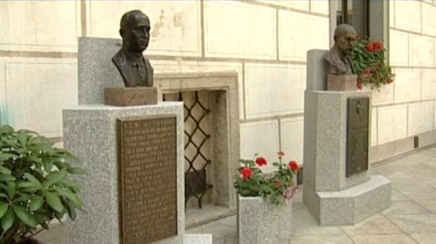 Busty Beneš TGM. Busty prezidentů T. G. Masaryka a Dr. E. Beneše na nádvoří Hotelu Růže v Českém Krumlově.